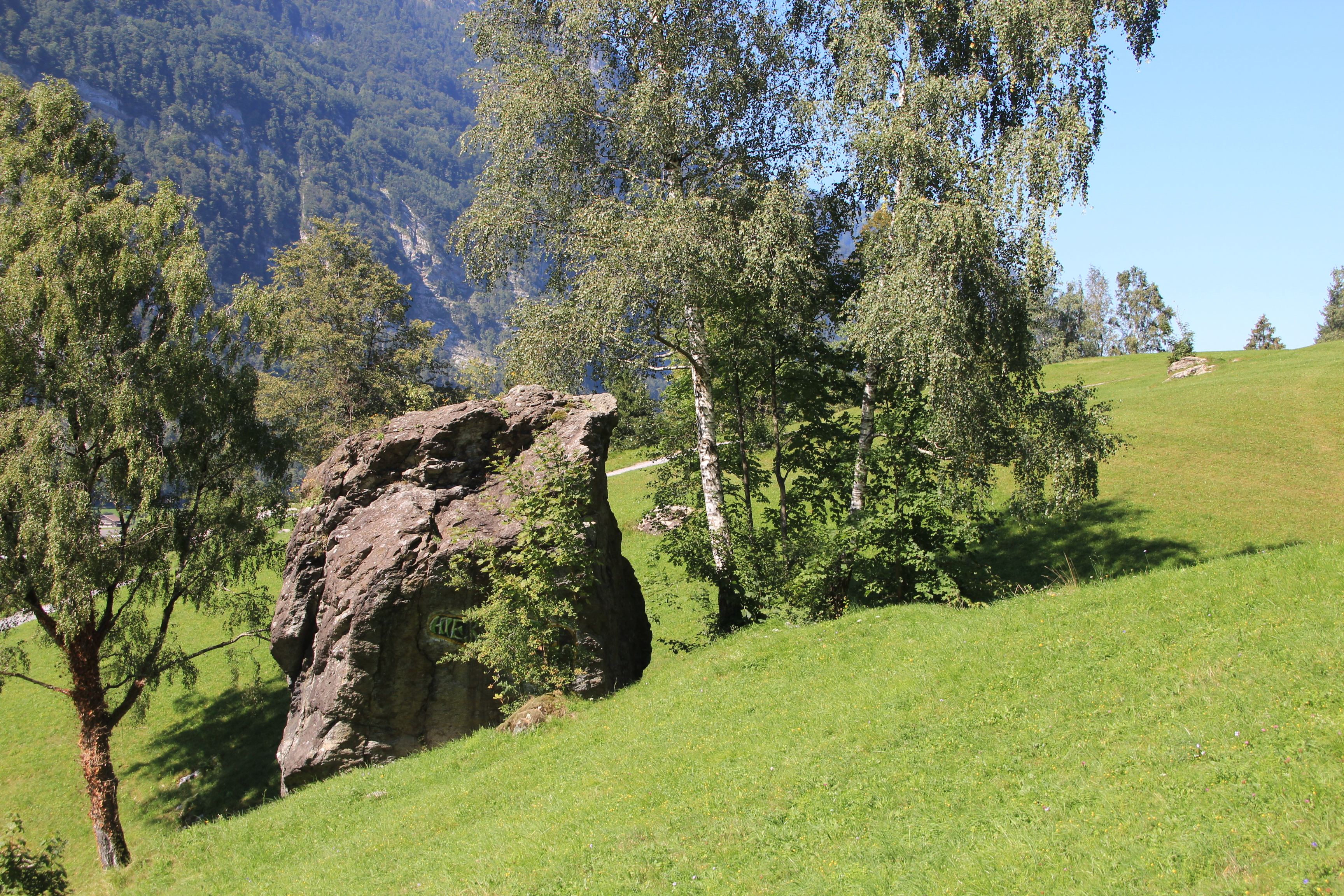 Schlattstein